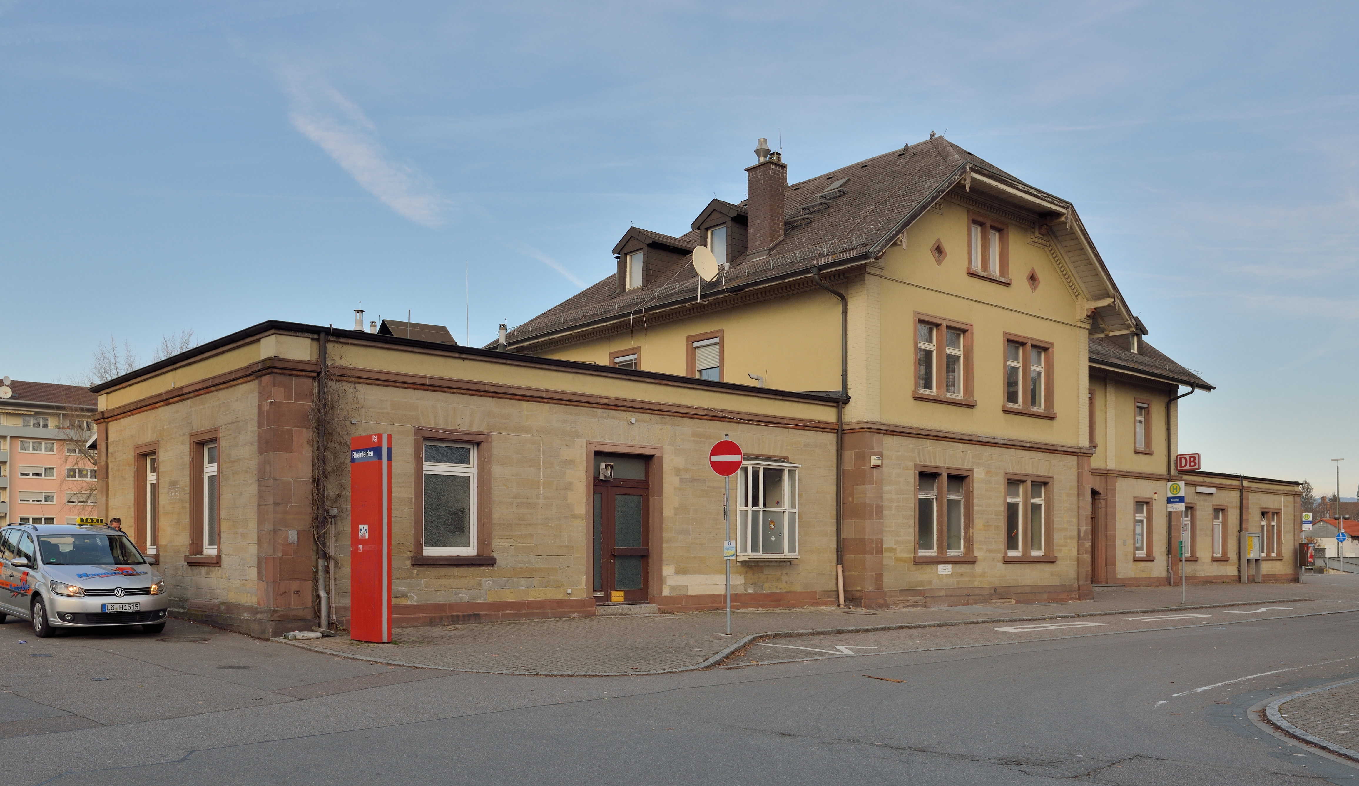 Rheinfelden: Bahnhofsgebäude